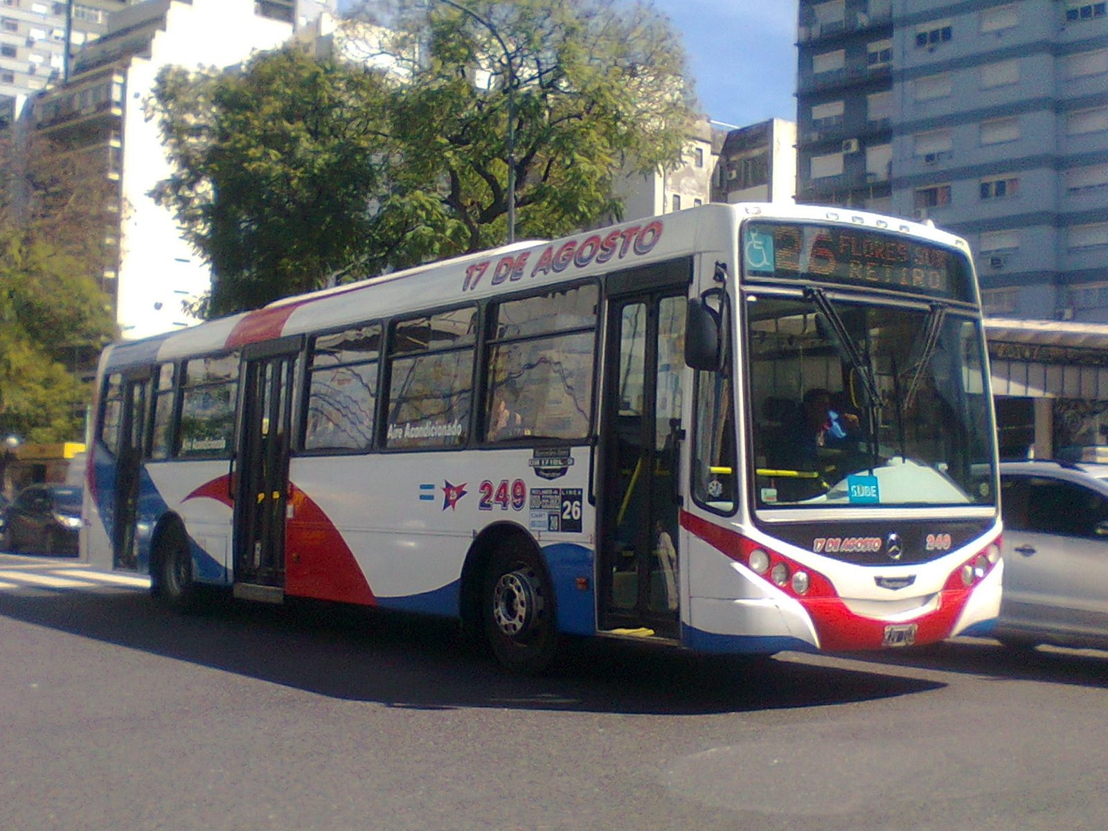 Unidad 249 de la Línea 26 de Buenos Aires